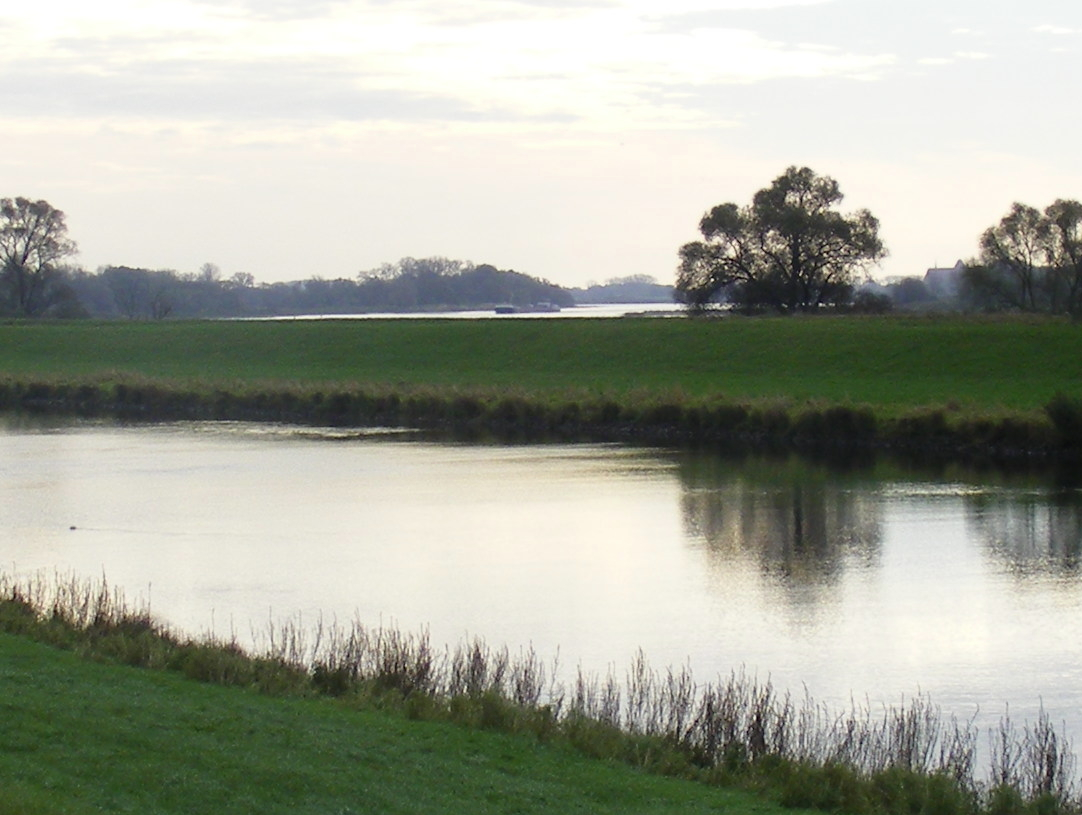 Blick vom Gnevsdorfer Vorfluter auf die Elbe. Rechts von dieser ist zwischen den Bäumen so eben die Kirche von Werben zu erkennen